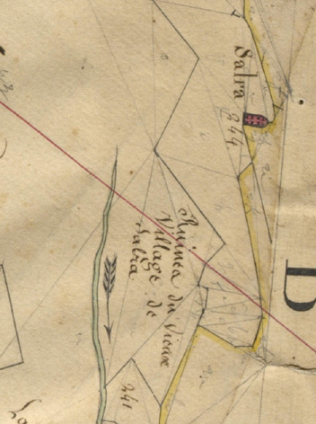 Celrà (Orellà) en el Cadastre napoleònic del 1812 (Arxius Departamentals dels Pirineus Orientals)